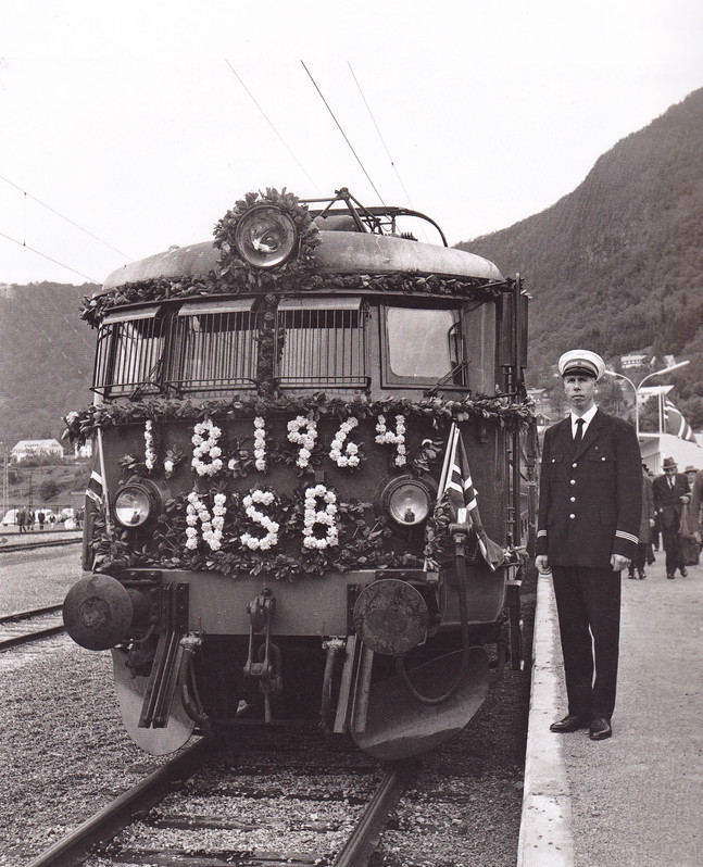 Åpningen av Ulrikstunnelen 1. august 1964 kl.16.20. Ragnar Blomdal, stasjonsmester i Arna, står ved lokomotivet.